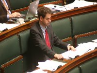 Zelfgemaakte foto.